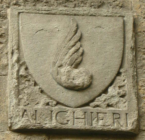 Casa di dante, stemma alighieri 01